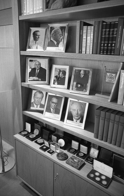 Arbeitszimmer von Bundeskanzler Helmut Schmidt im neuen Bundeskanzleramt